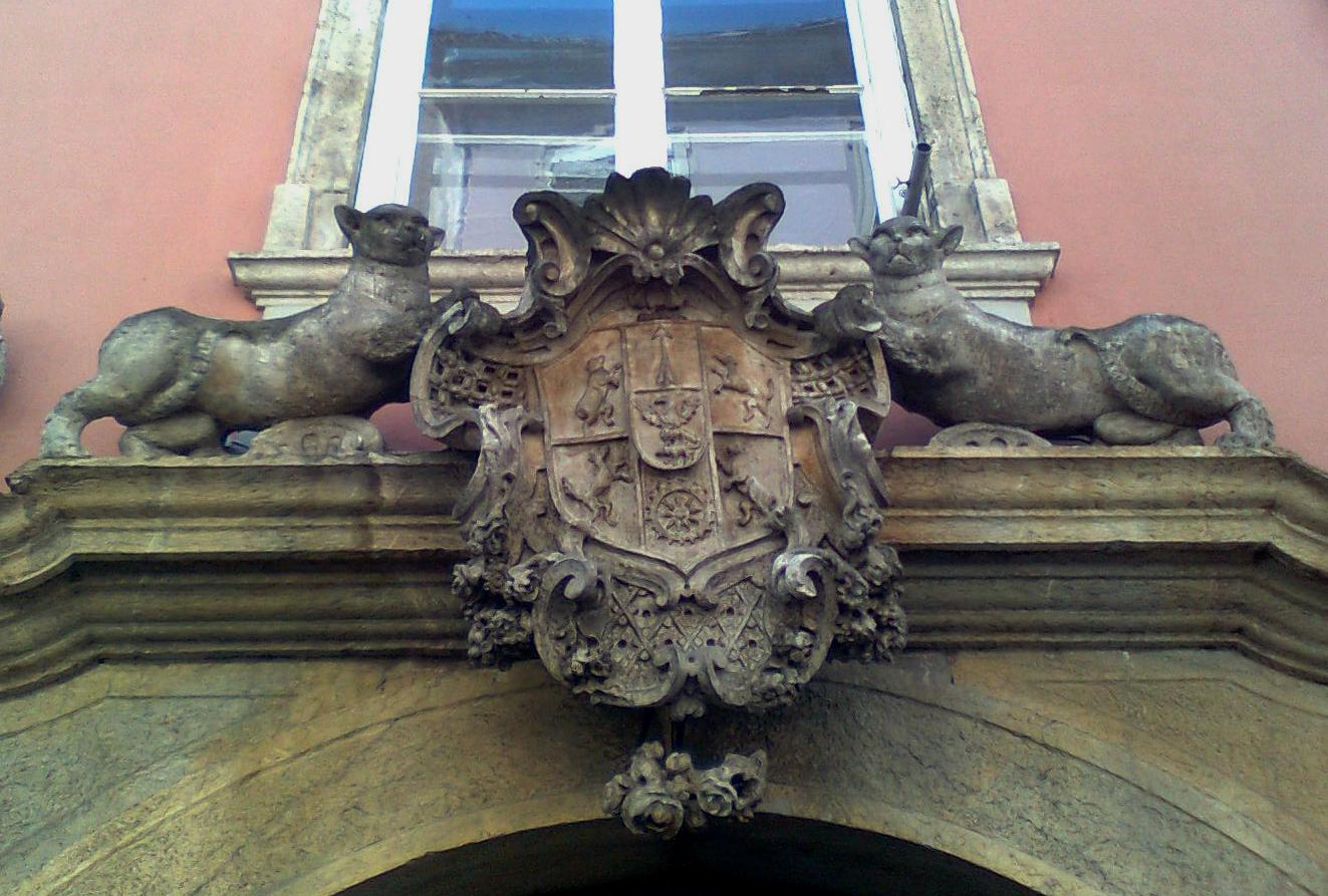 Portaldetail Palais Katzianer, Graz